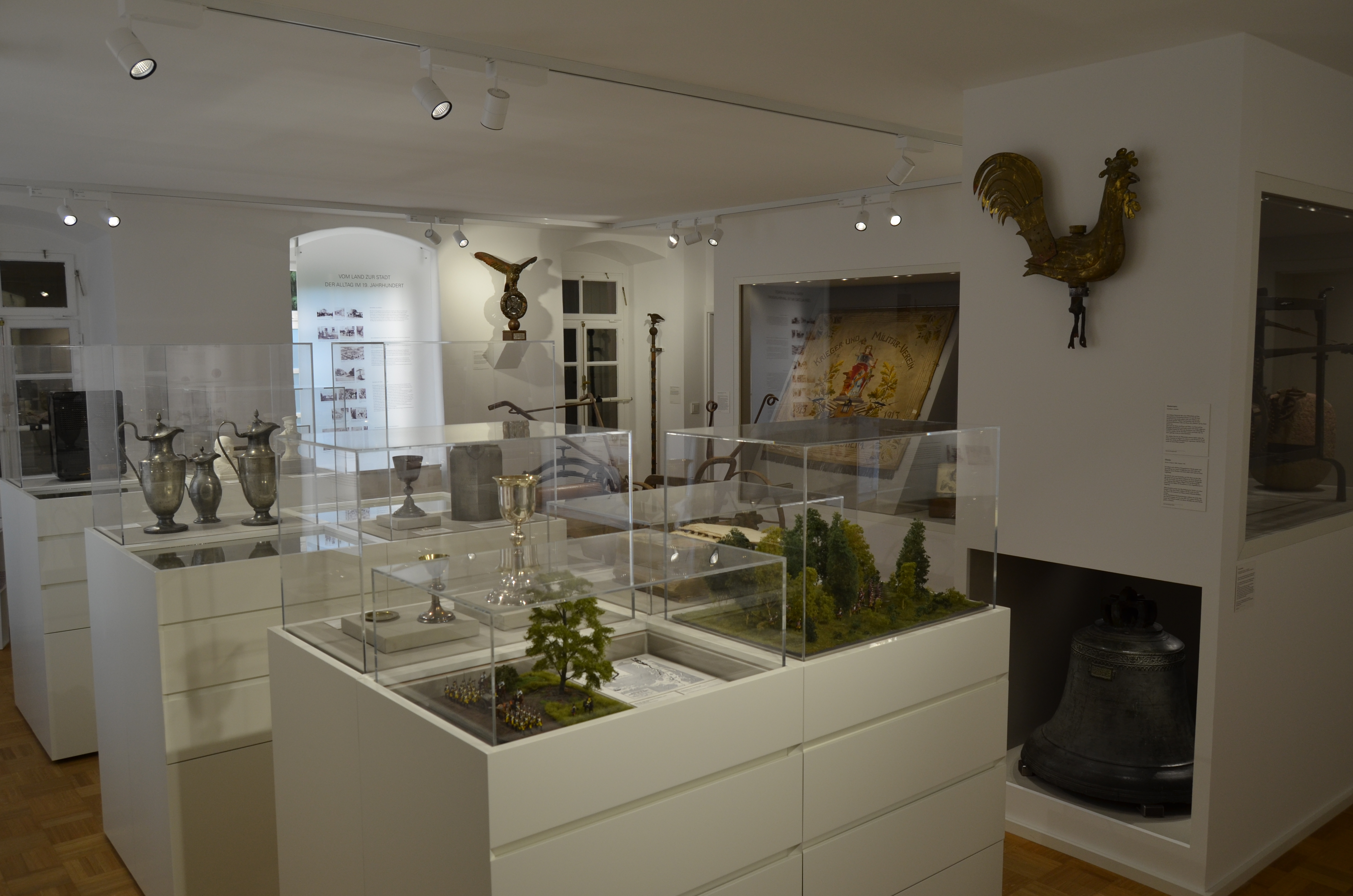 Ausstellung